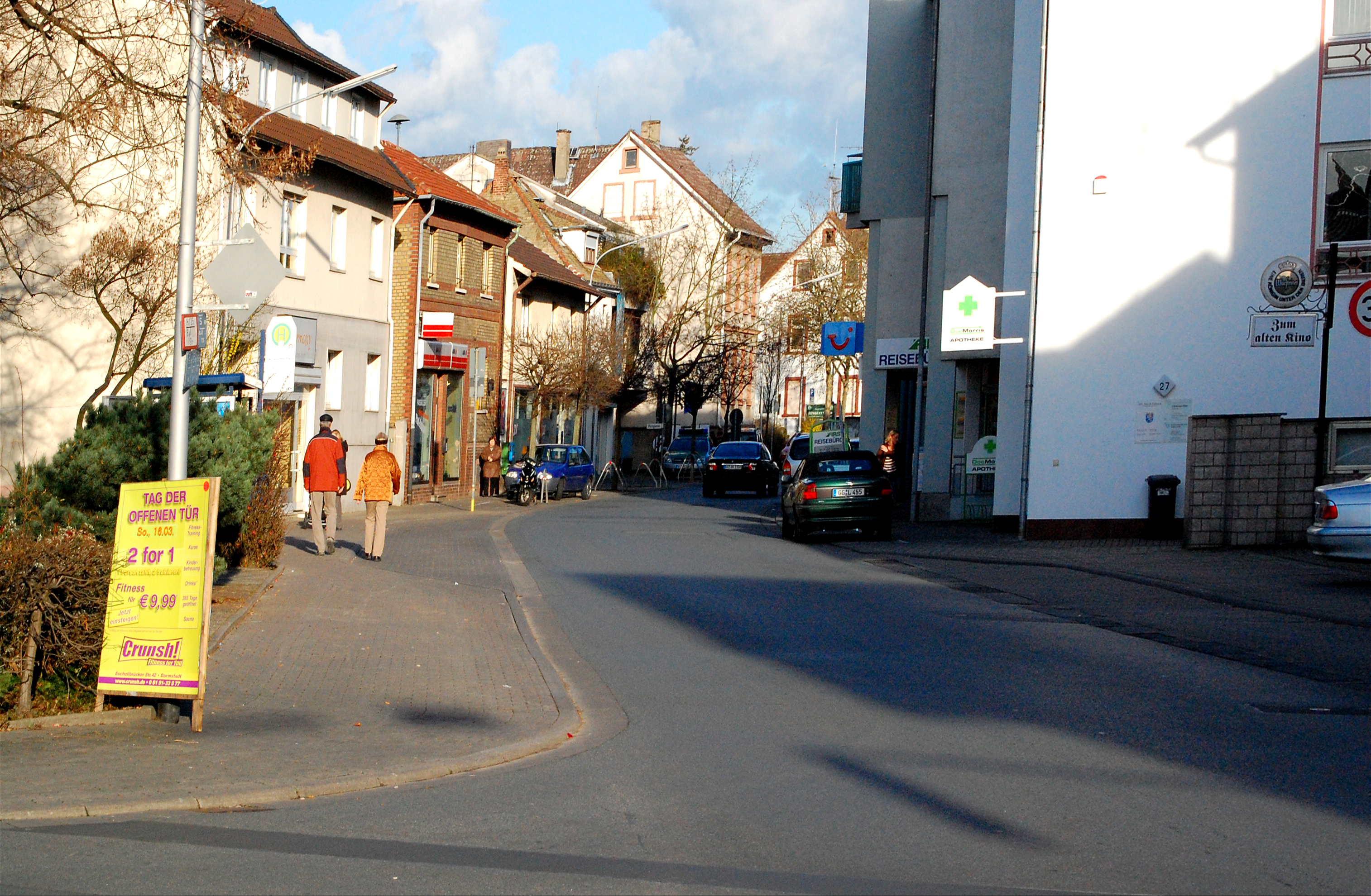 Die Darmstädterstraße in Weiterstadt